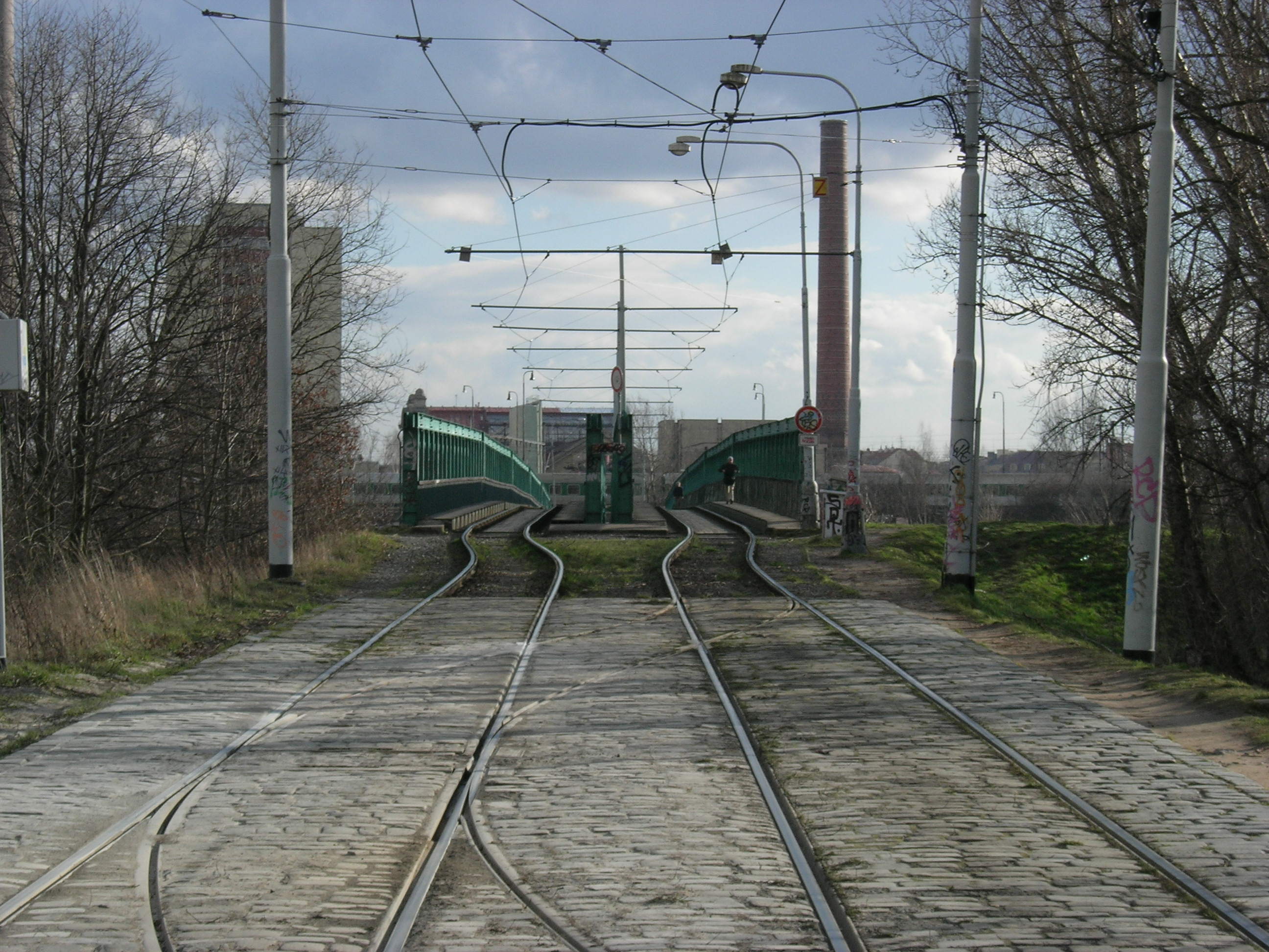 Troja tram bridge